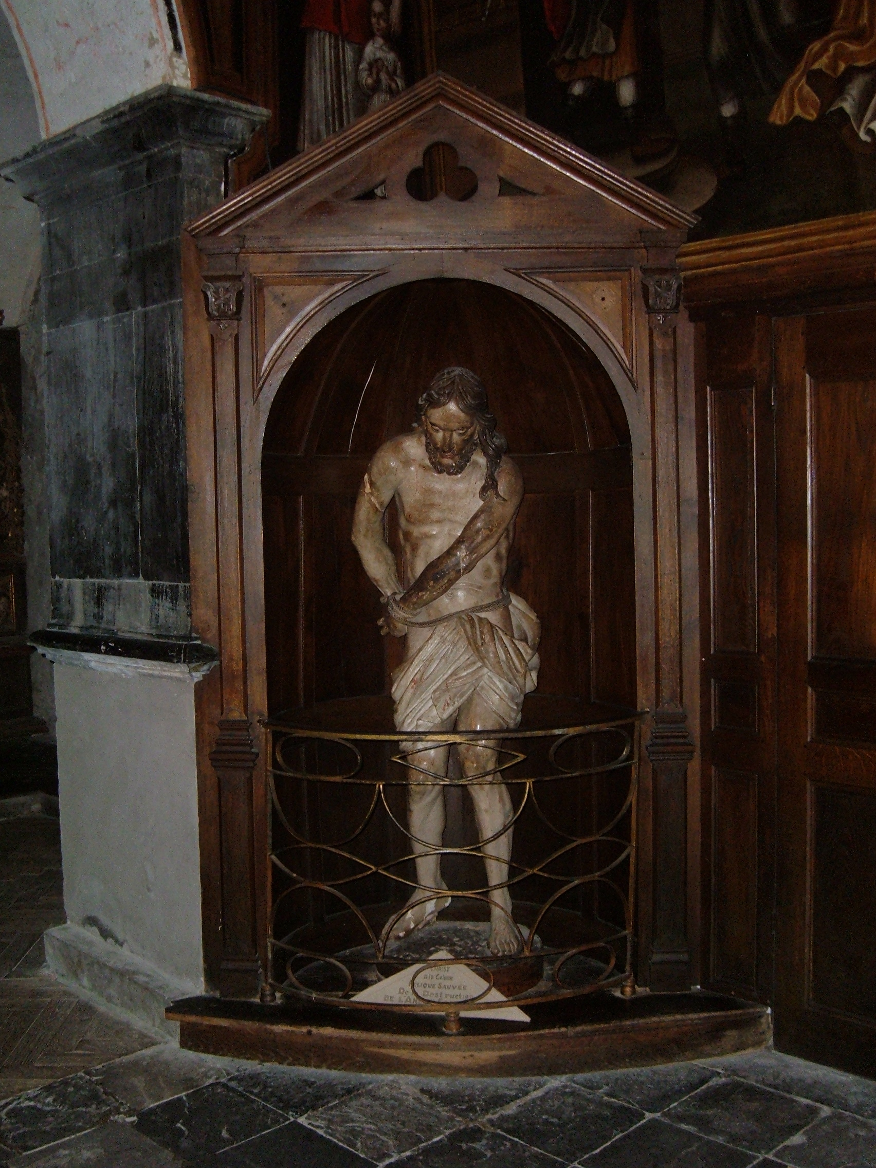 Ancienne statue du Christ en bois, dans le Sanctuaire de Bétharram.